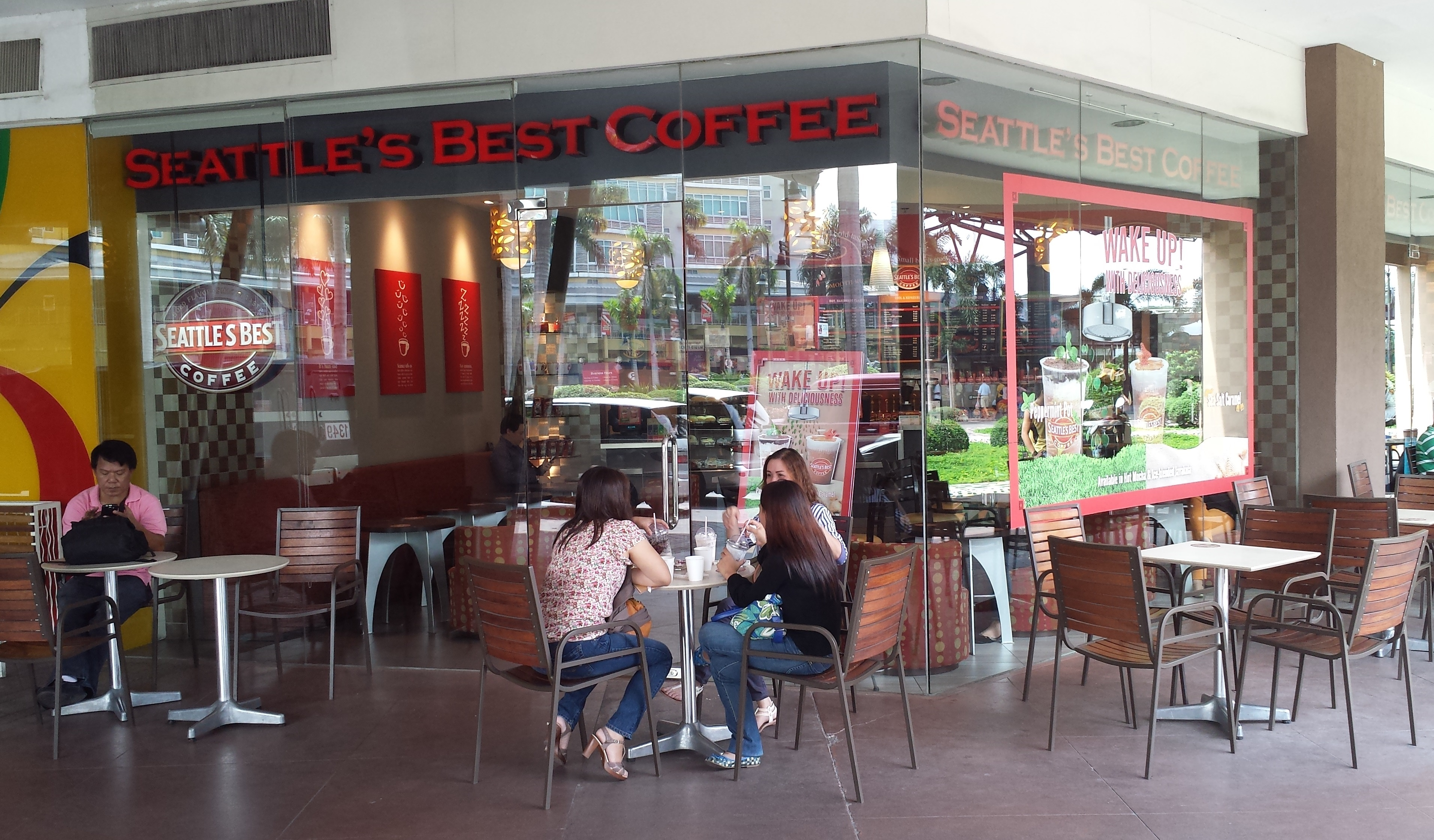 The coffee shop "Seattle's Best Coffee" at the "Market! Market!" mall in Bonifacio Global City, Metro Manila, Philippines